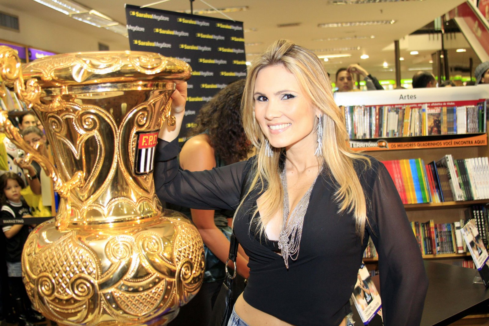 A participante do Big Brother Brasil 9 Josiane no lançamento do Livro do Corinthians.